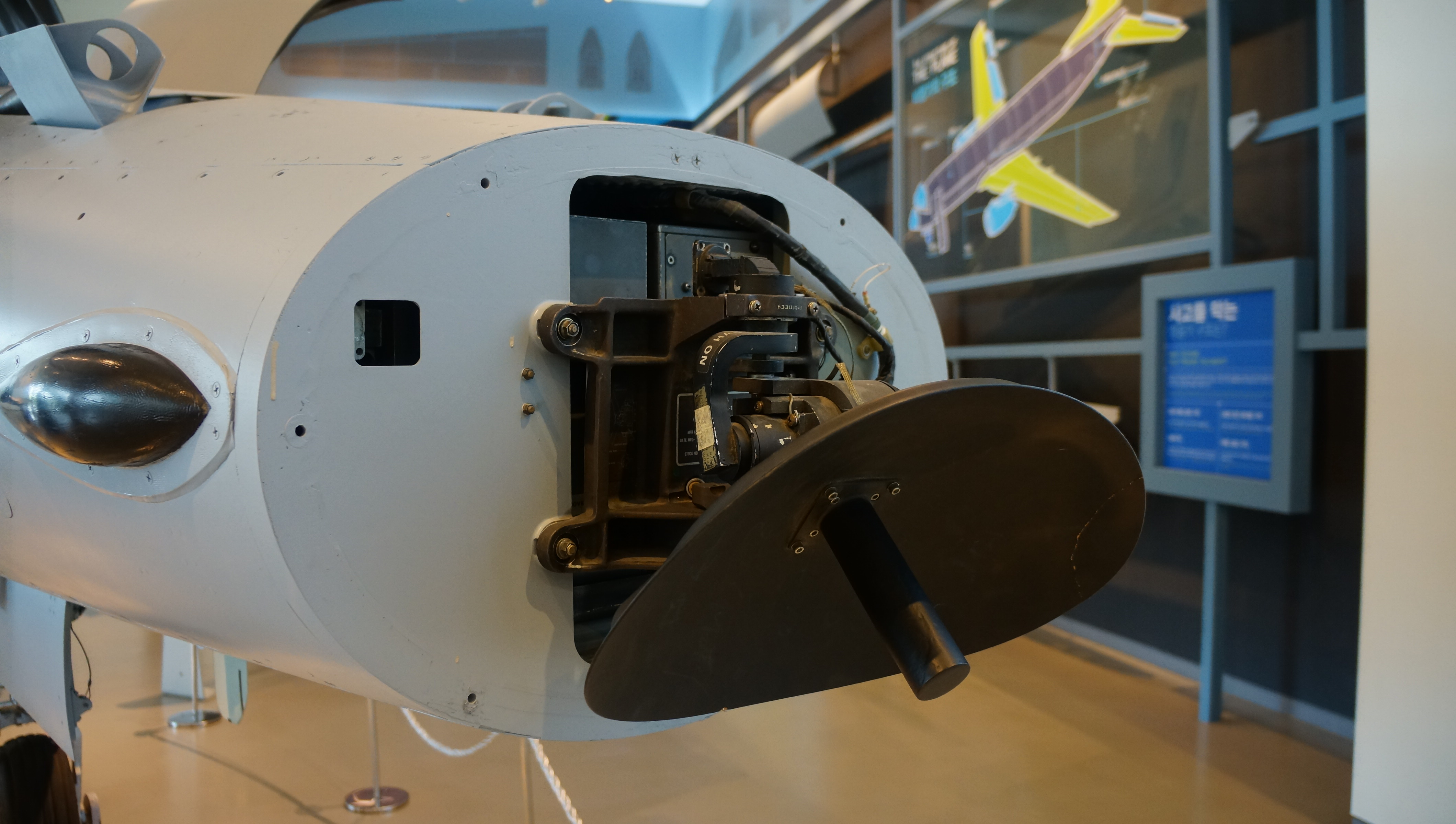 大韓民国空軍 F-5E戦闘機に搭載されているAN/APQ-153レーダー アンテナ部分。 2014年6月6日 済州航空宇宙博物館内にて。